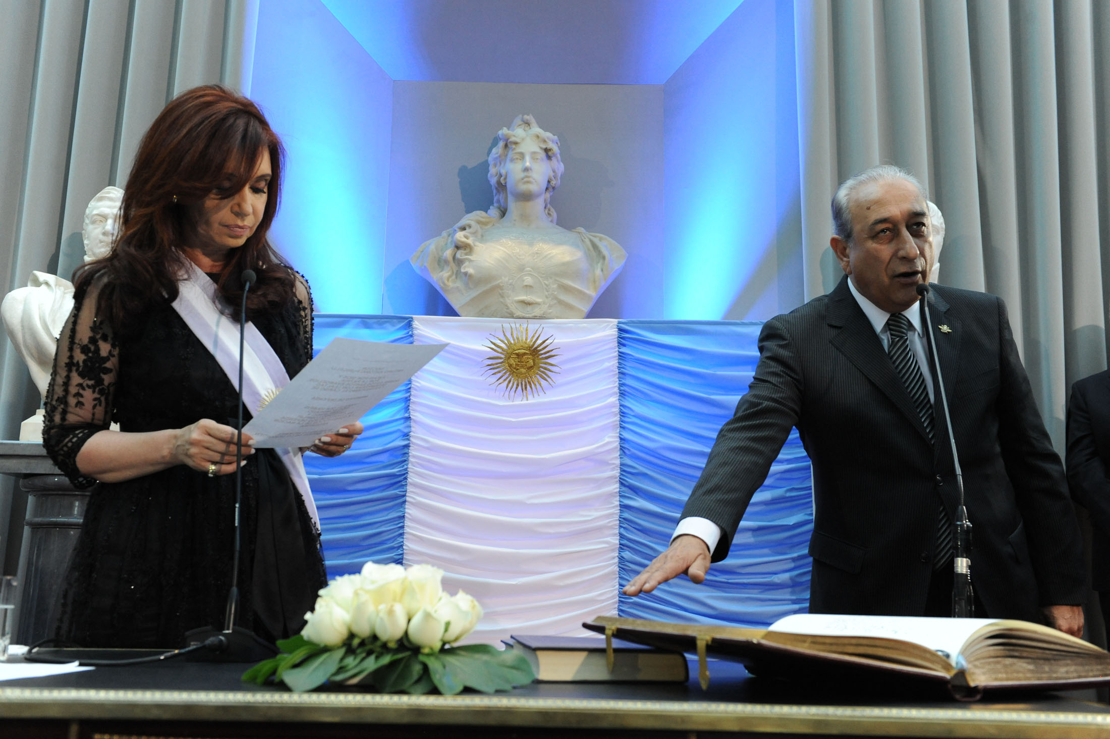 Jura del Ministro de Defensa Arturo Puricelli en 2011